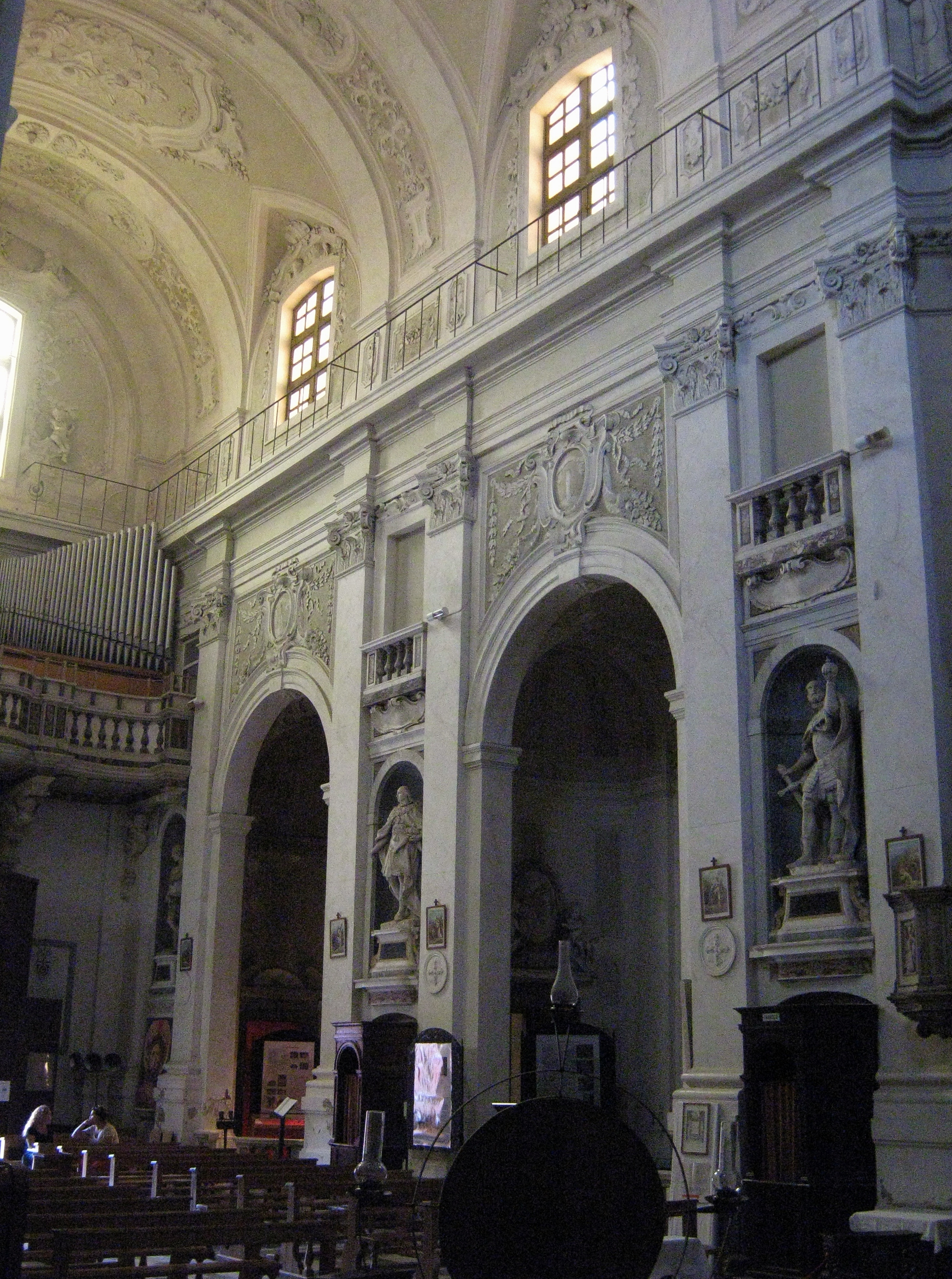 Livorno, interno della chiesa di San Ferdinando (XVIII secolo)